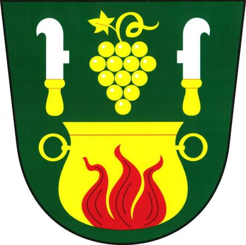 znak, Dyjákovičky, okres Znojmo